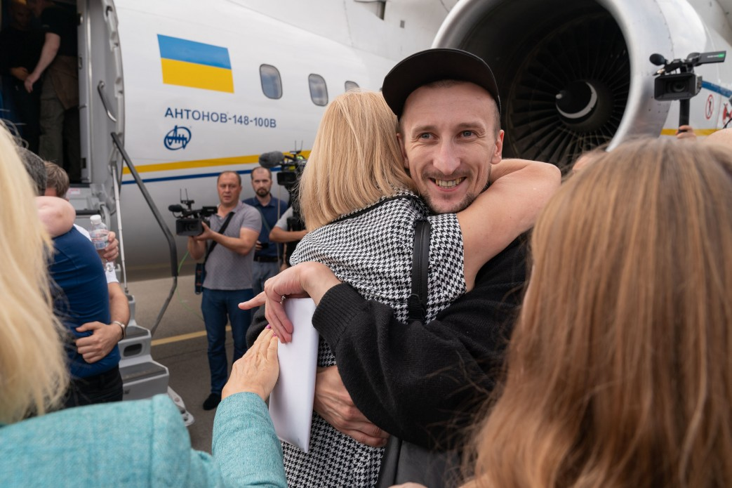 Президент зустрів українців, які повернулися додому у рамках взаємного звільнення Україною та РФ утримуваних осіб, 7 вересня 2019 року